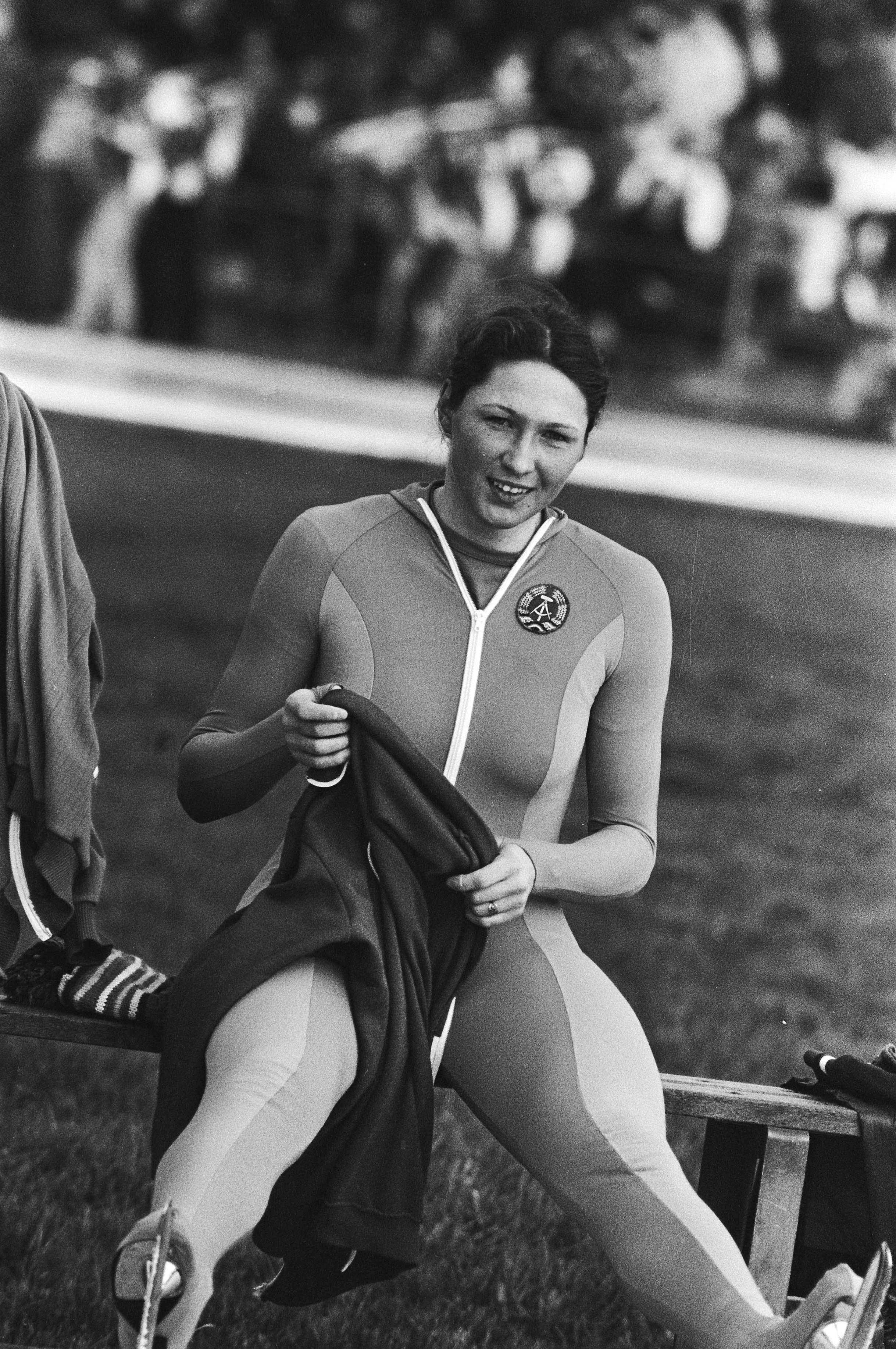 Collectie / Archief : Fotocollectie Anefo Reportage / Serie : EK schaatsen vrouwen in Heerenveen Beschrijving : Karin Enke op de bank Datum : 23 januari 1983 Locatie : Friesland, Heerenveen Trefwoorden : schaatsen, schaatswedstrijden, sport Persoonsnaam : Karin Enke Fotograaf : Bogaerts, Rob / Anefo Auteursrechthebbende : Nationaal Archief Materiaalsoort : Negatief (zwart/wit) Nummer archiefinventaris : bekijk toegang 2.24.01.05 Bestanddeelnummer : 932-4752